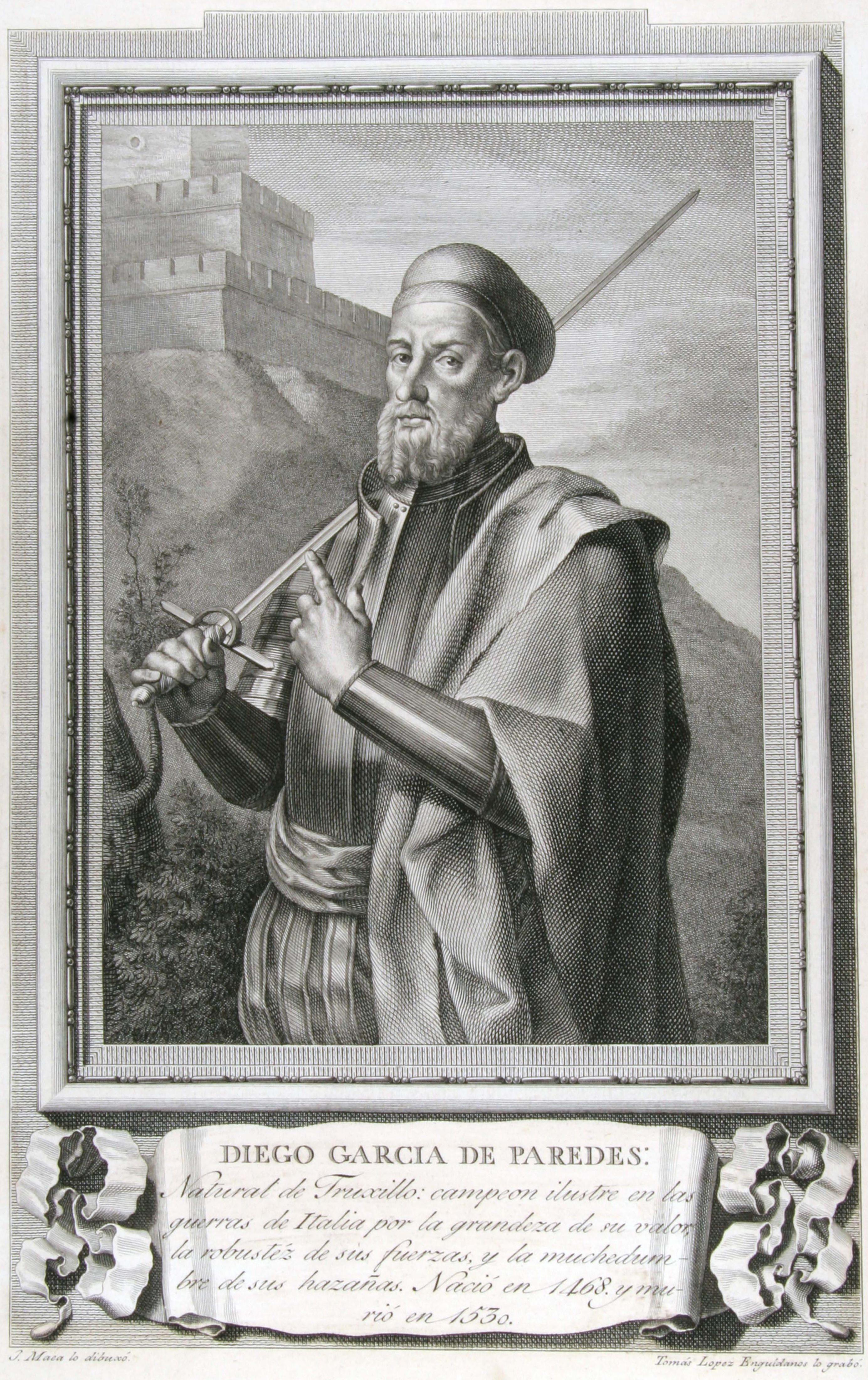 Retrato de Diego García de Paredes (1468 - 1533), conocido como "El Sansón de Extremadura"